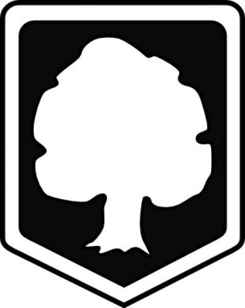 Abzeichen des CCB laut einem veröffentlichen Artikel in der Verbandszeitung "die schwarzburg" 3-2010, S. 3, mit Titel "Ein Symbol für das Cartell Christlicher Burschenschaften"